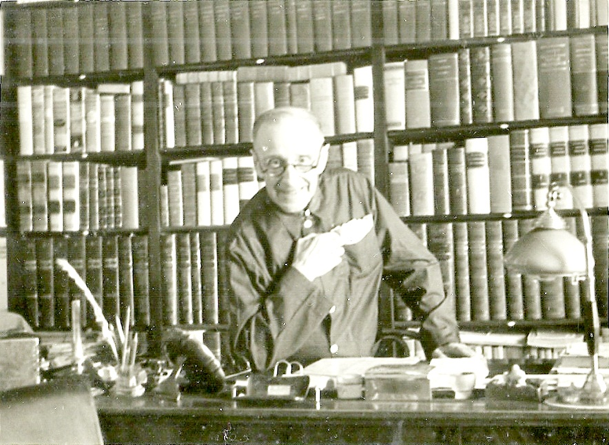 Аҧсшәа: Giuseppe Viggiani en su estudio